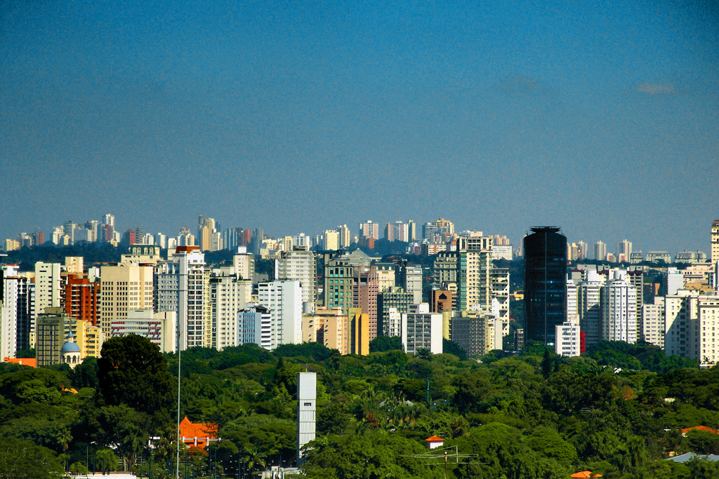 Jardim Paulistano, São Paulo, Brasil.